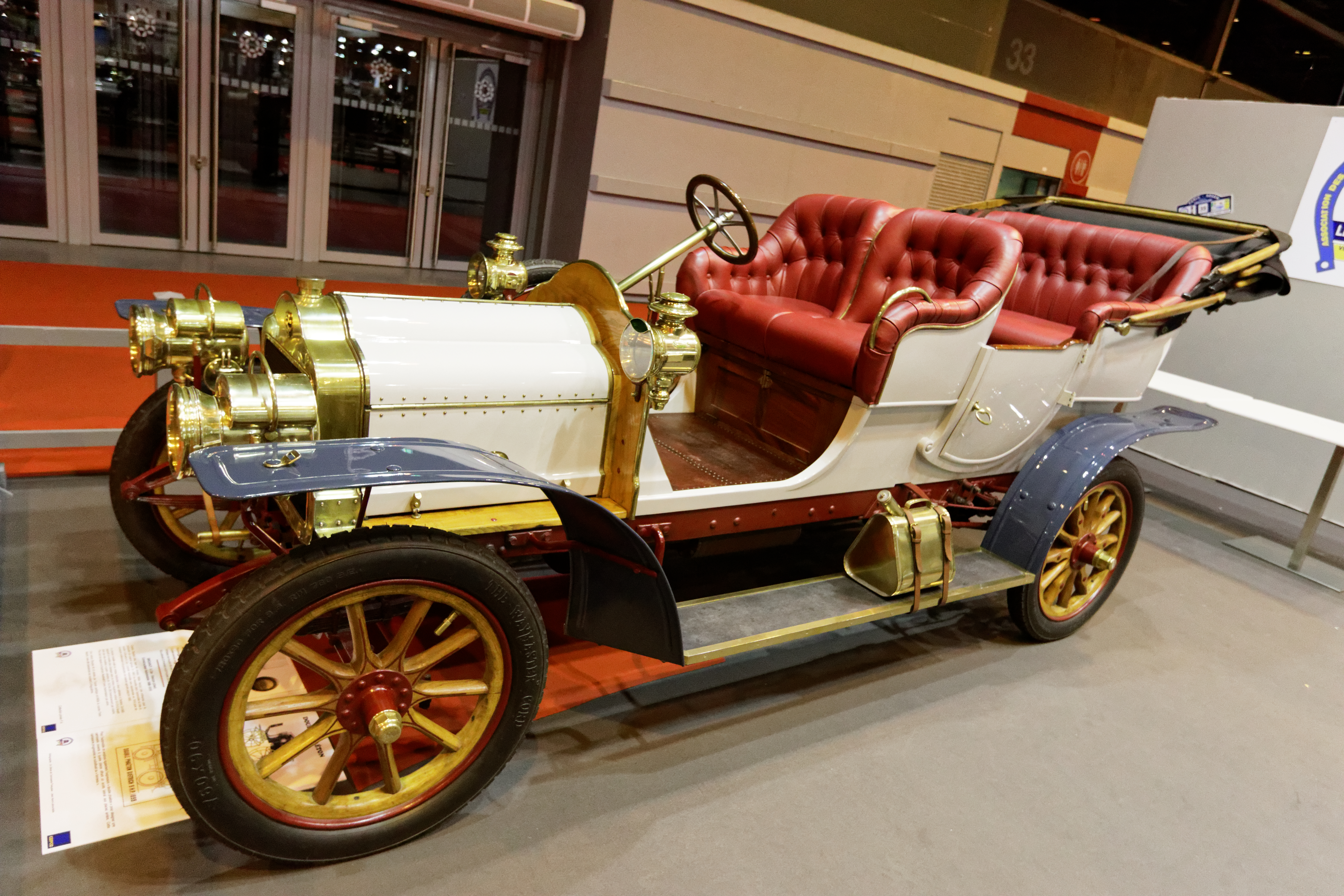 Une Brouhot Type D de 1908 exposée lors du salon Rétromobile 2016.